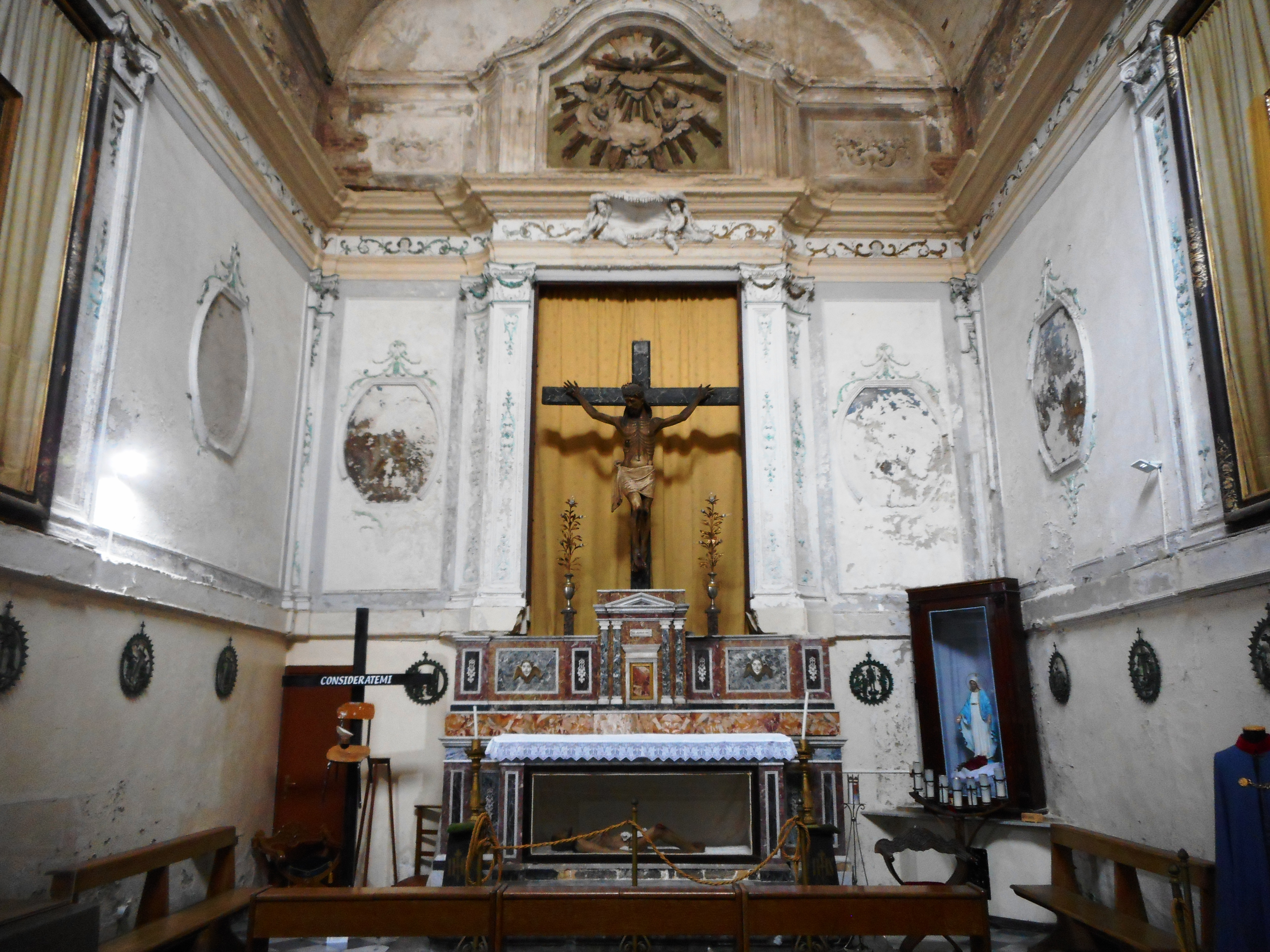 Interno dell'oratorio del Santissimo Crocifisso alla Magione